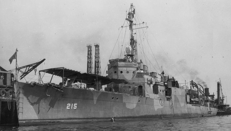 USS Borie (DD-215) at Balboa, Canal Zone, ca. August 1942.